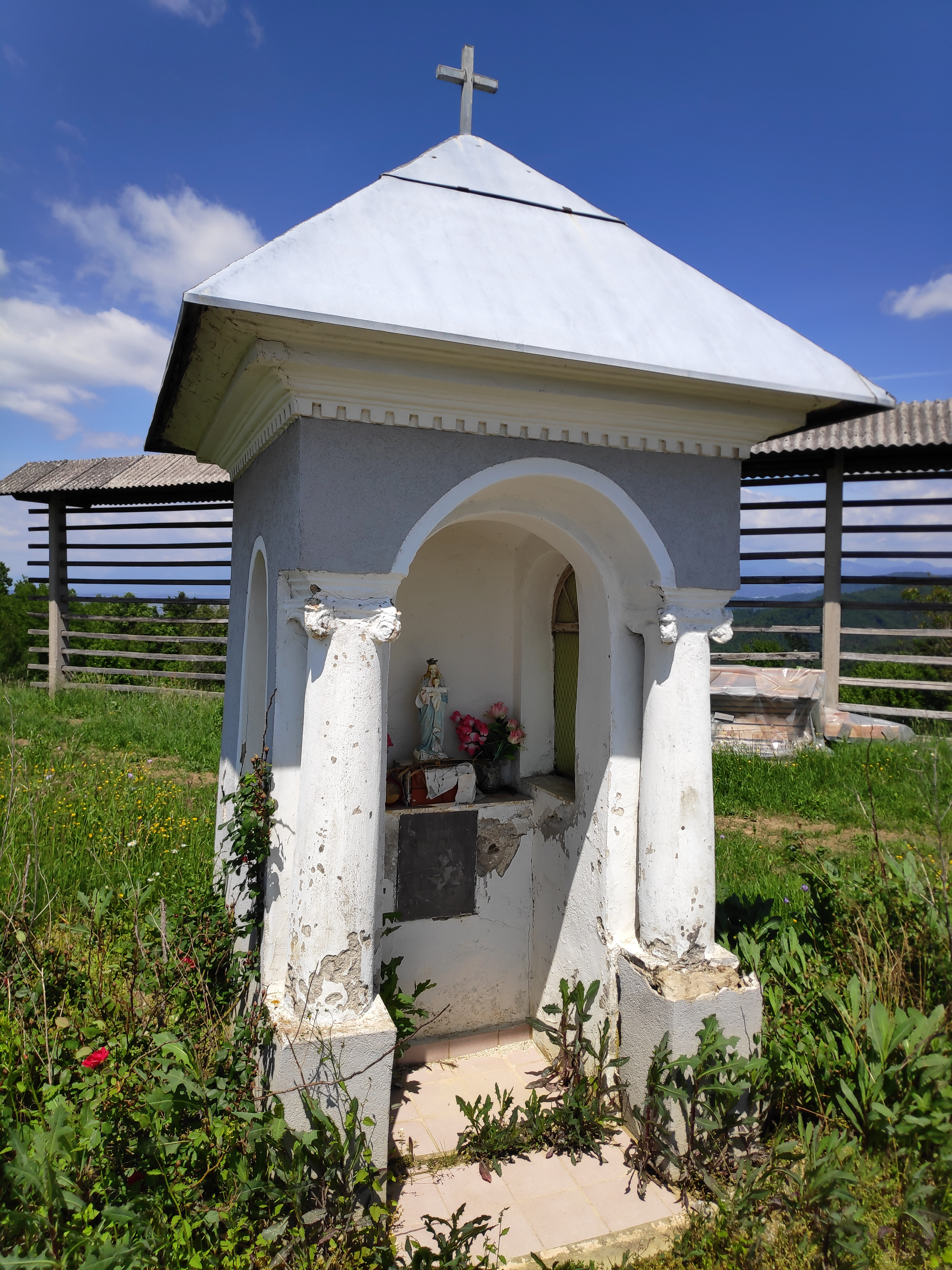 Črnivčeva kapelica v spomin na "Mico Jančarco" poleg črnivčeve kmetije (Vnajnarje)